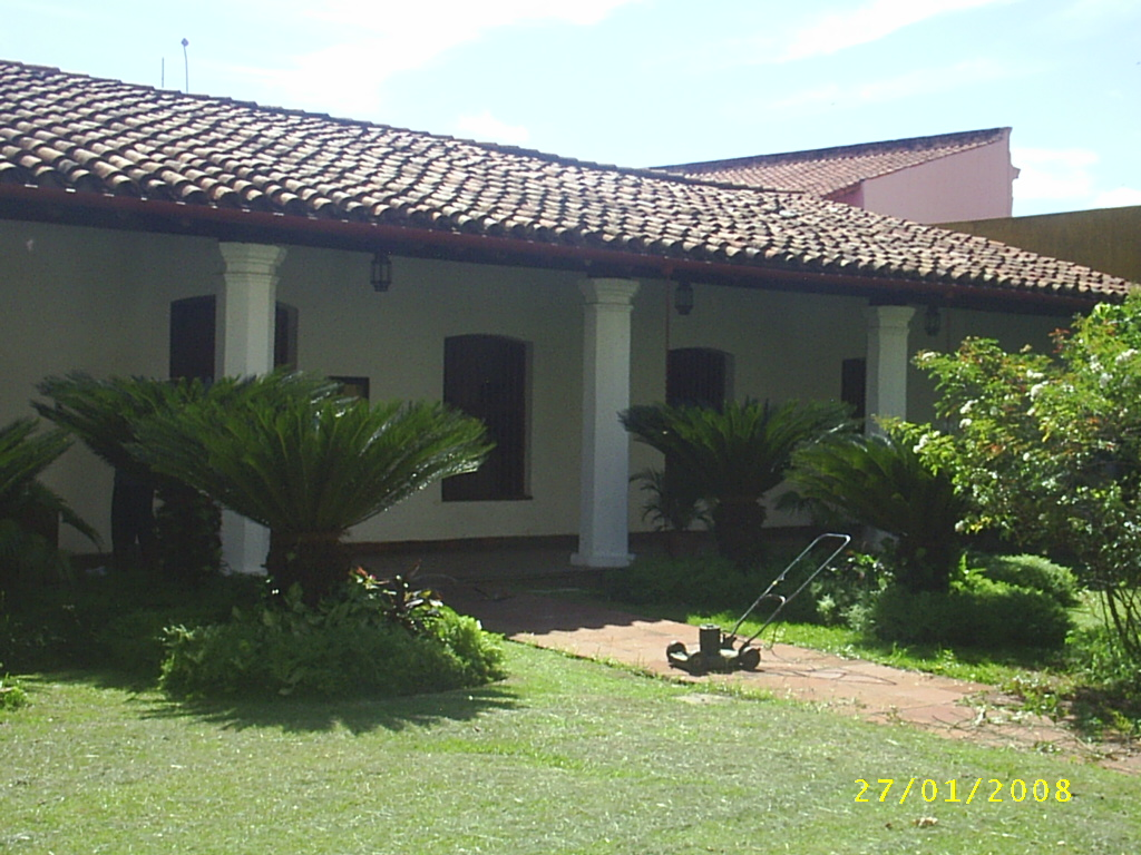 Casa Casatelví. Manzana de la Rivera